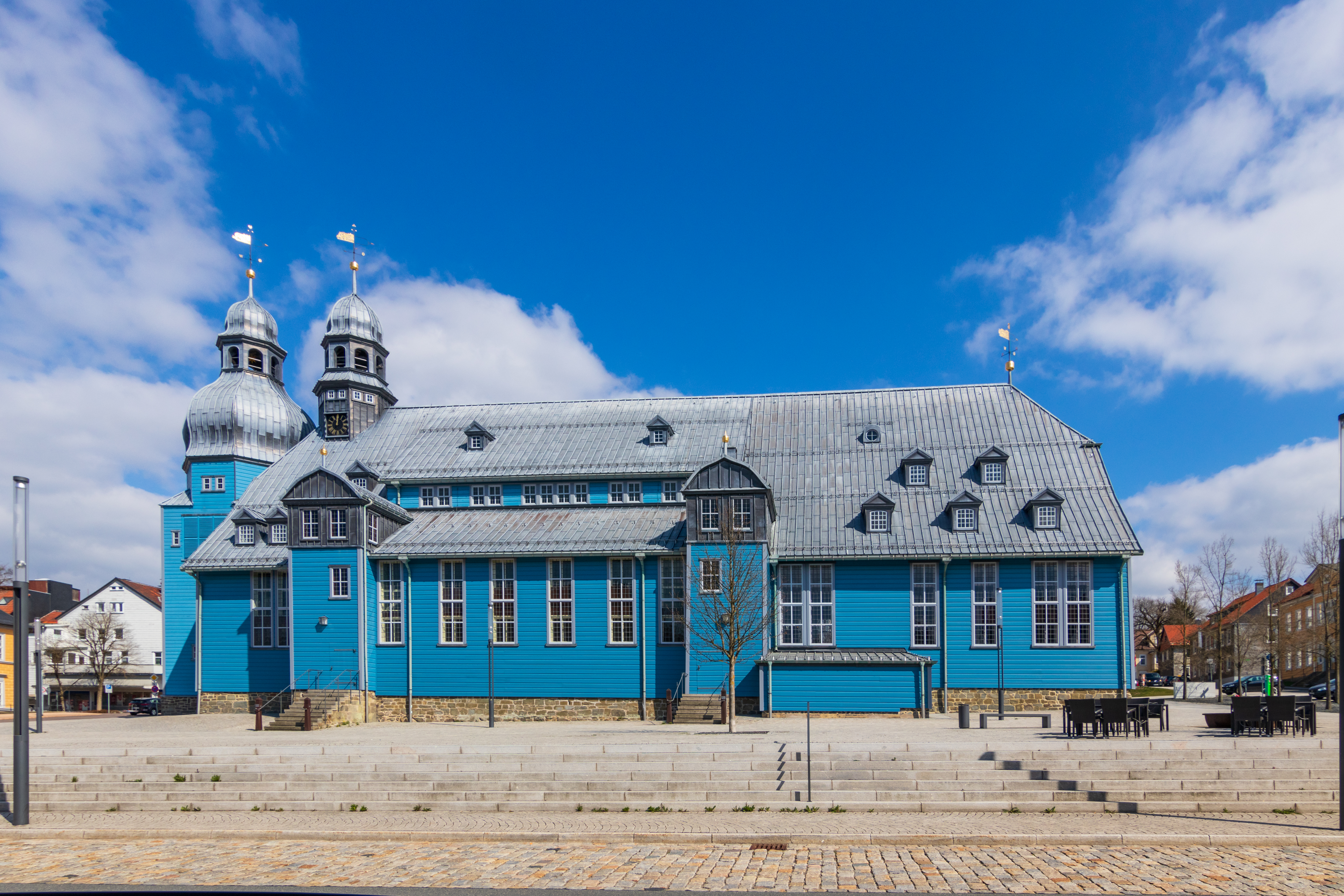 Die evangelisch-lutherische Marktkirche zum Heiligen Geist ist die historische Hauptkirche im Ortsteil Clausthal der Bergstadt Clausthal-Zellerfeld. Sie ist die größte Holzkirche Deutschlands und gehört durch ihre Architektur und Ausstattung zu den bedeutendsten Baudenkmälern des norddeutschen Barocks.